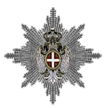 Ster Orde van de Witte Adelaar Servie